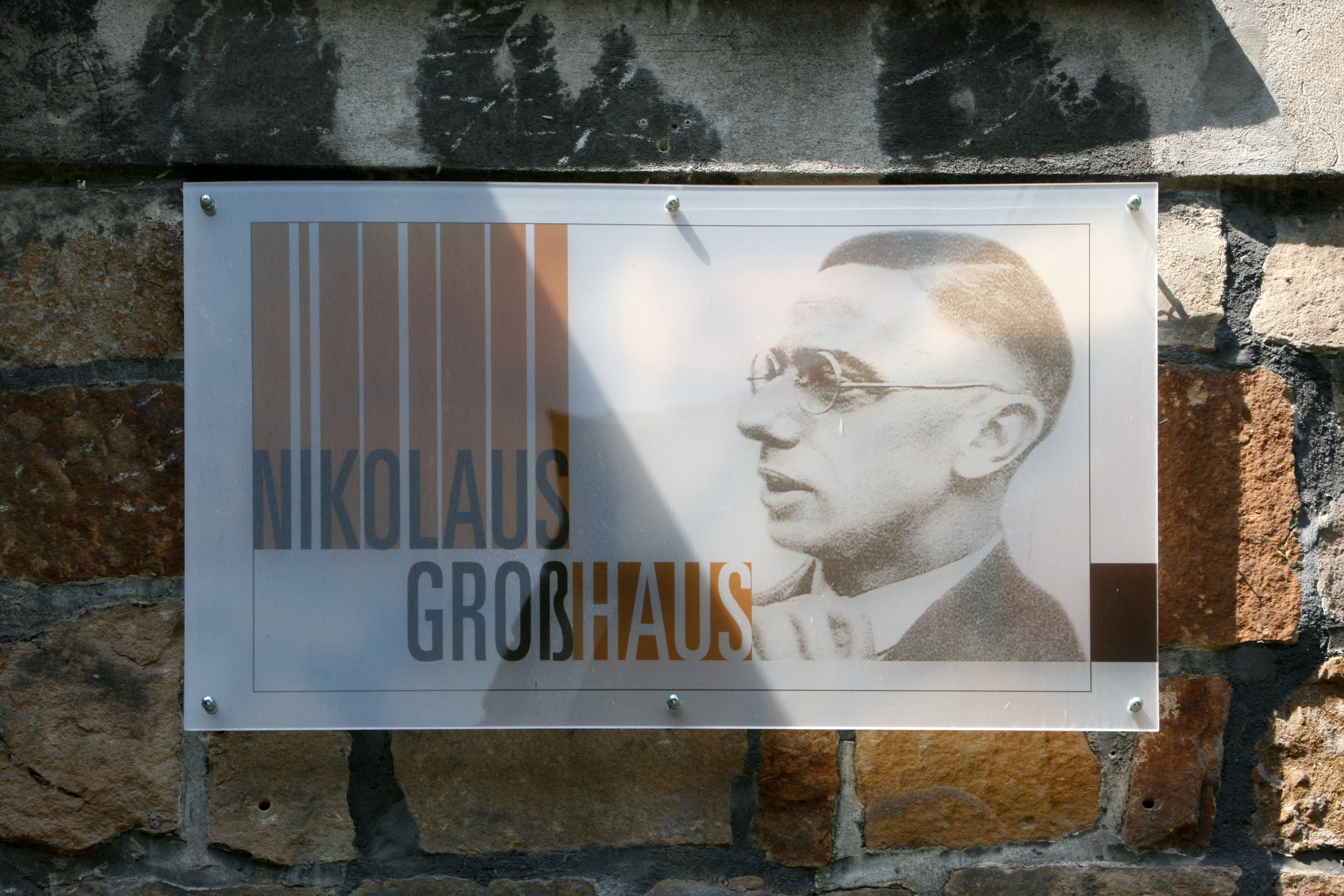 Nikolaus-Groß-Haus, Domplatz 2a in Hattingen-Niederwenigern